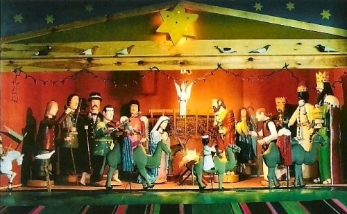 Bożonarodzeniowa Szopka Betlejemska w Muzeum Ludowym Rodziny Brzozowskich